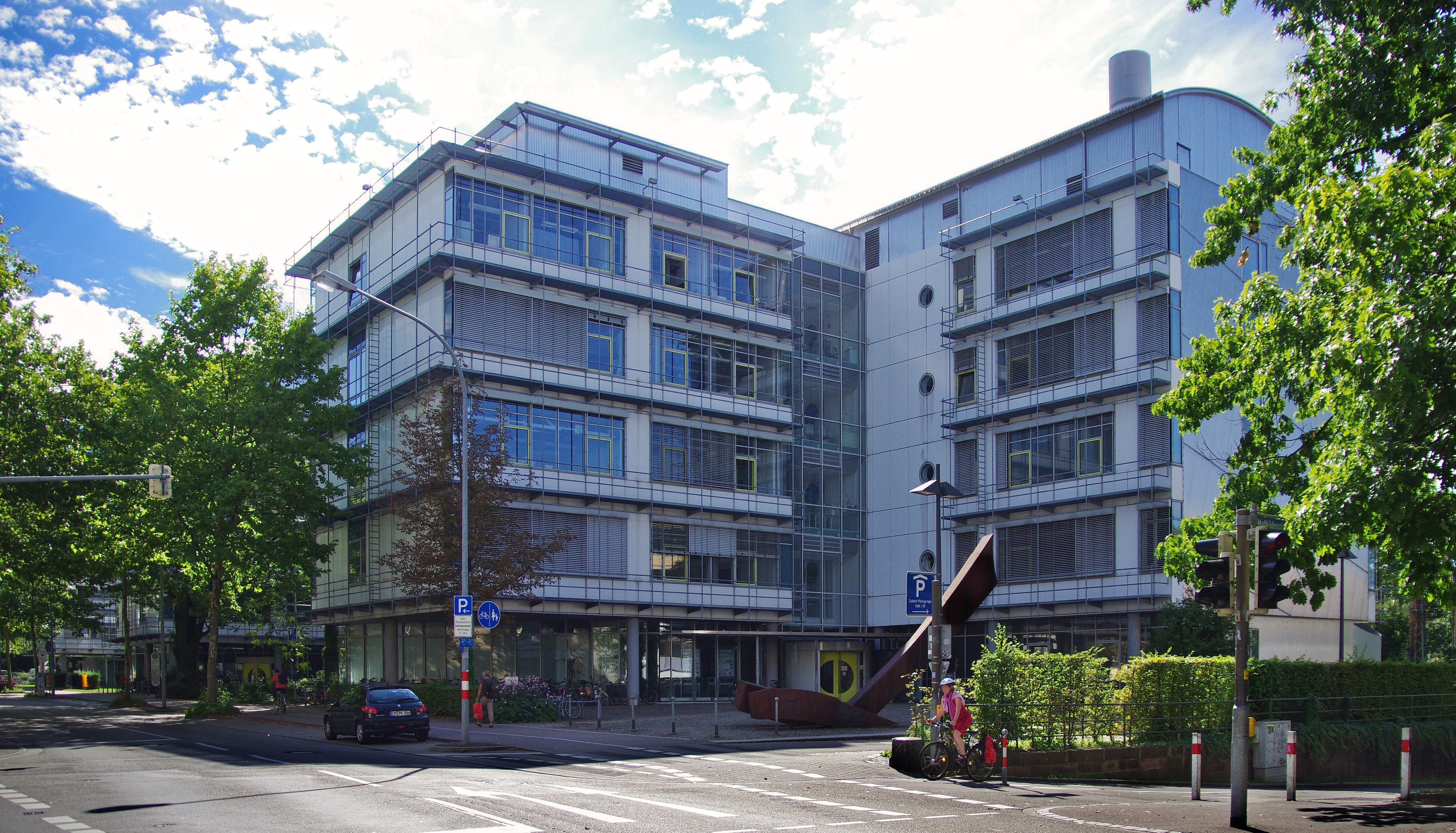 Das Freiburger Materialforschungszentrum / Institut für Molekulare Medizin IMMZ